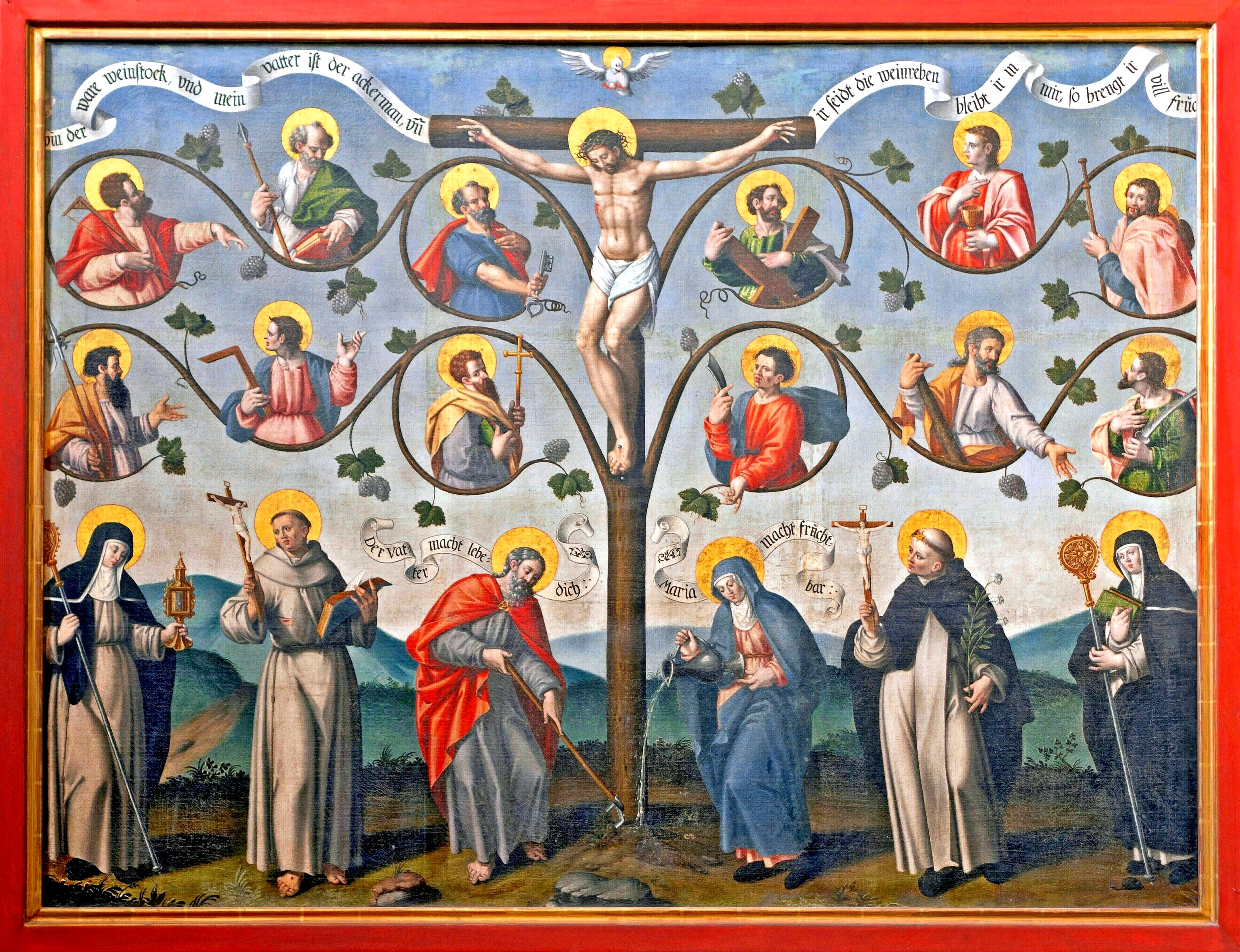 Christus, der wahre Weinstock. Ölgemälde aus dem frühen 17. Jahrhundert, Stiftskirche St.Castor in Karden an der Mosel. In den Weinranken Bilder der zwölf Apostel mit ihren jeweiligen Attributen. Darunter Gottvater als Winzer und Maria als Winzerin, flankiert von zwei heiligen Mönchen und Nonnen.